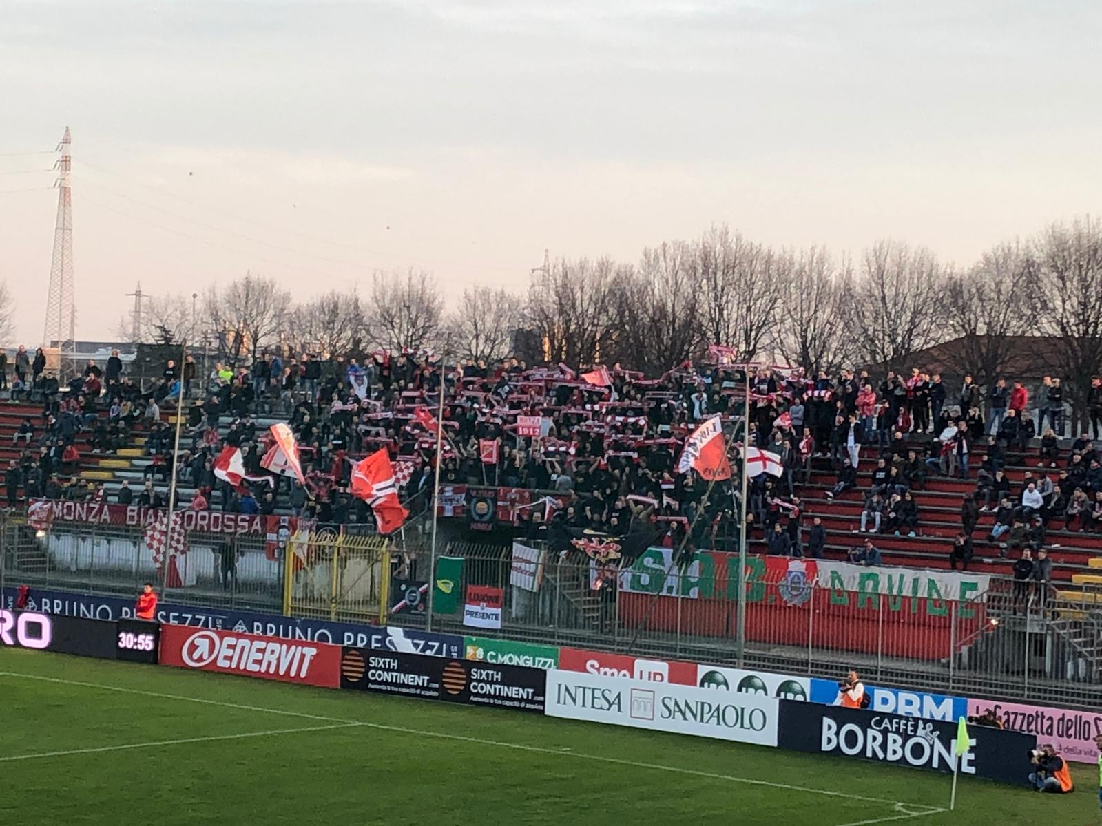 Ultras Monza curva sud Davide Pieri vs Vis Pesaro